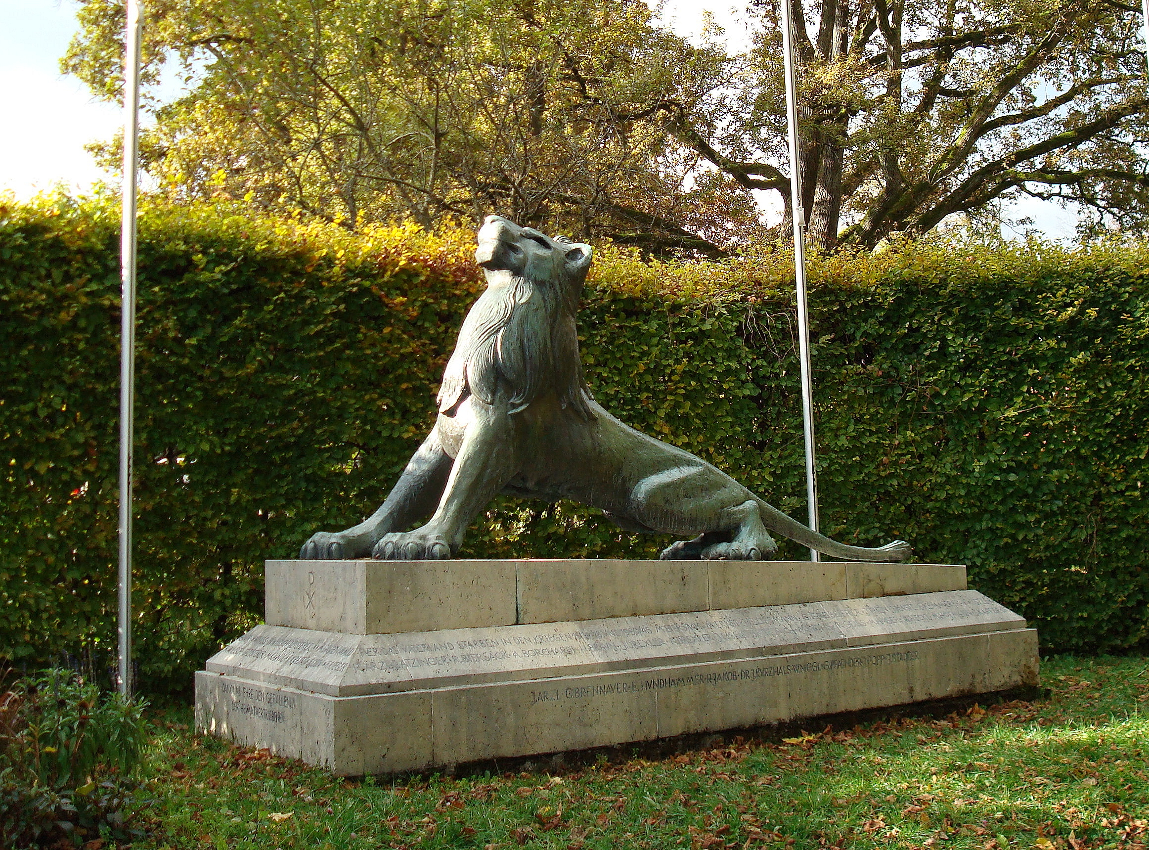 Feldafing, Tutzinger Straße 14. Denkmal für die Gefallenen des Ersten und Zweiten Weltkrieges.